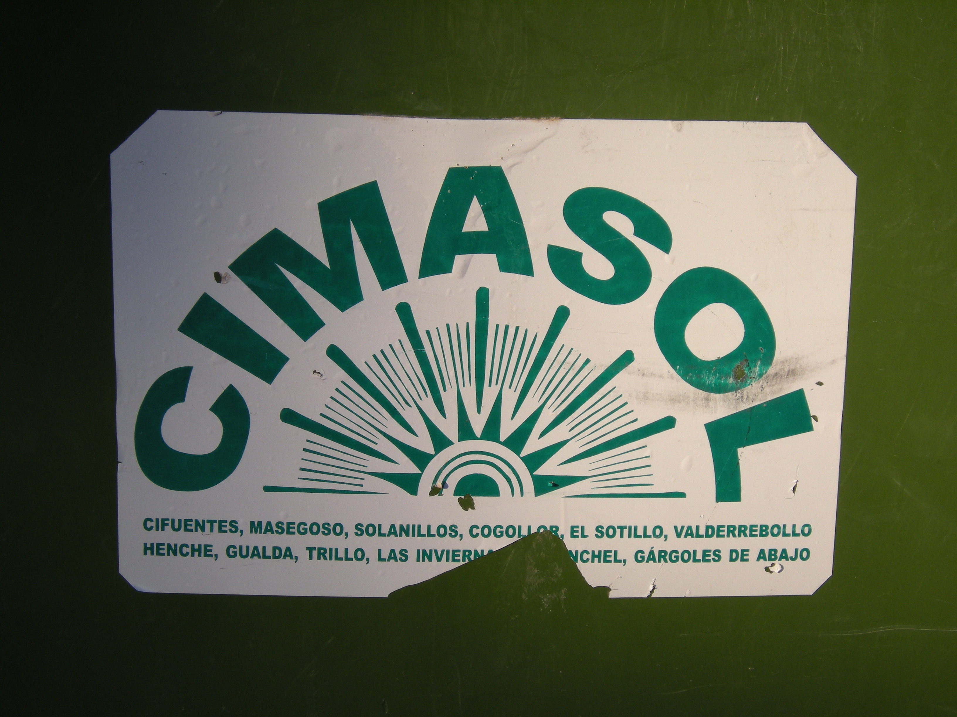 Logotipo de la Moancomunidad Cimasol